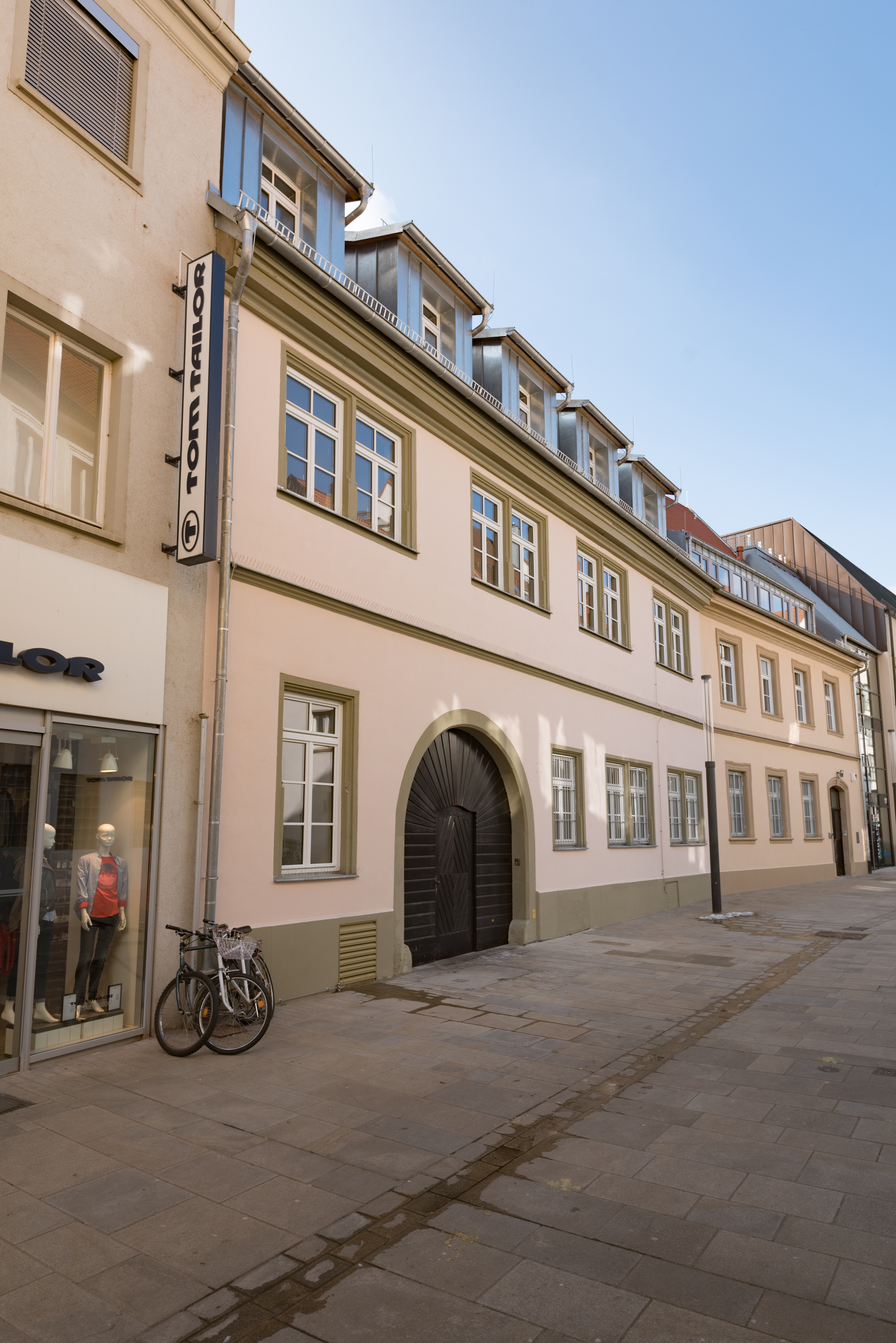 Schweinfurt , Lange Zehntstraße 15